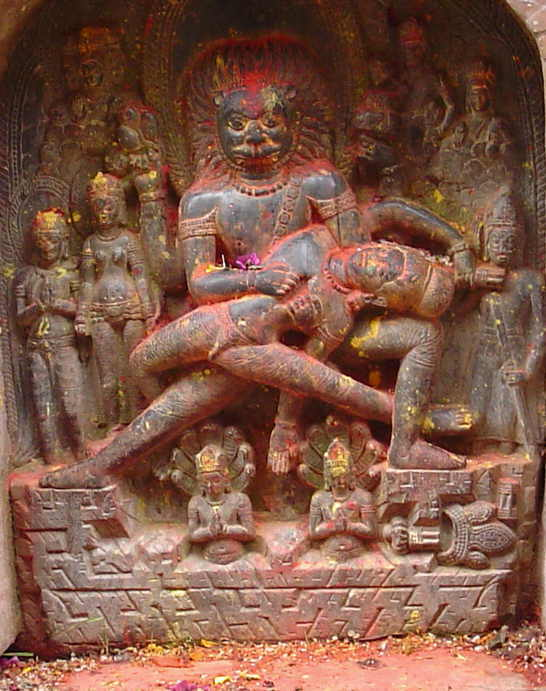 Храм Чангу НараянРезьба по камню в храме Чангу Нараян, Непал